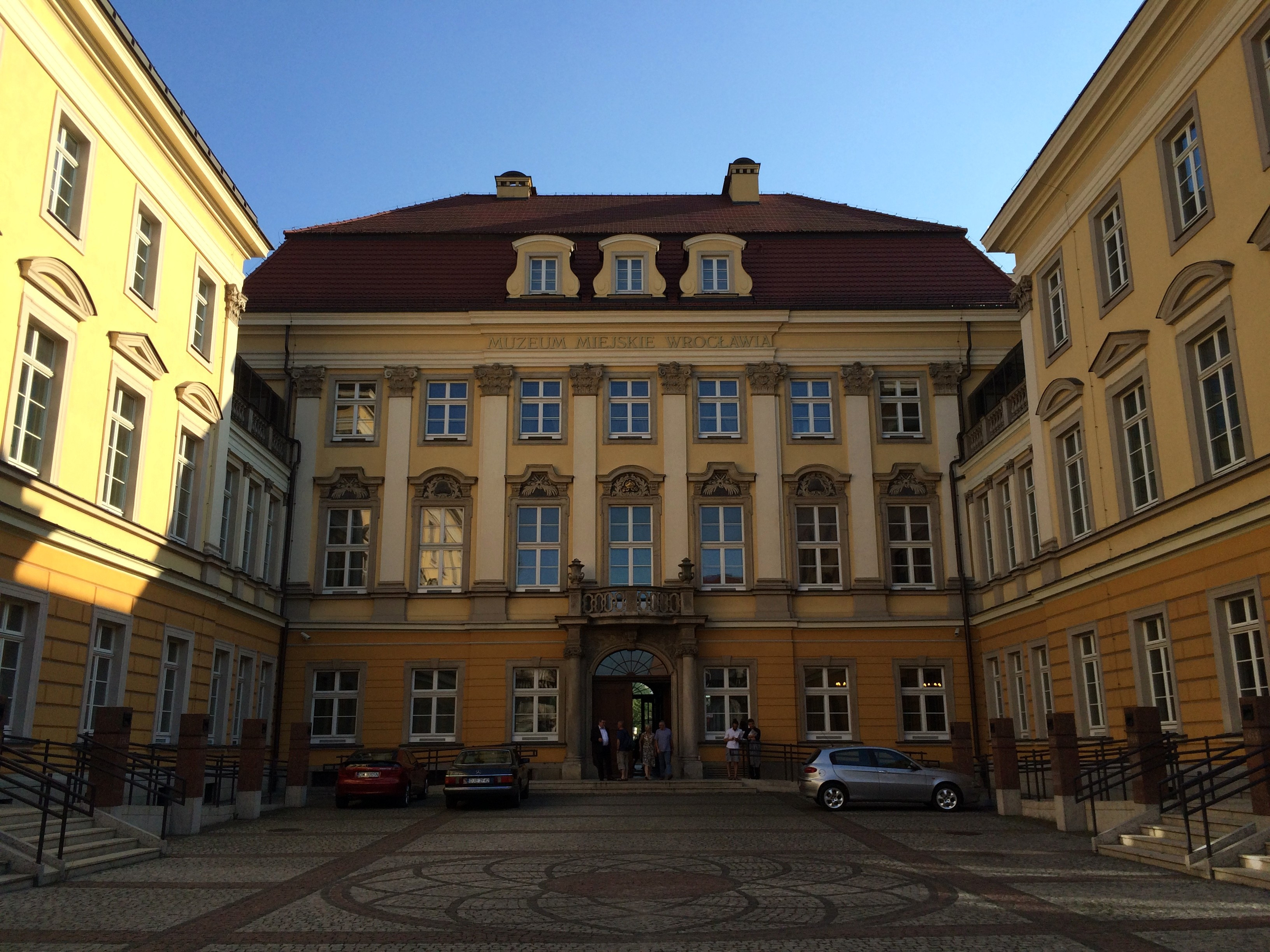 Muzeum Miejskie Wrocławia